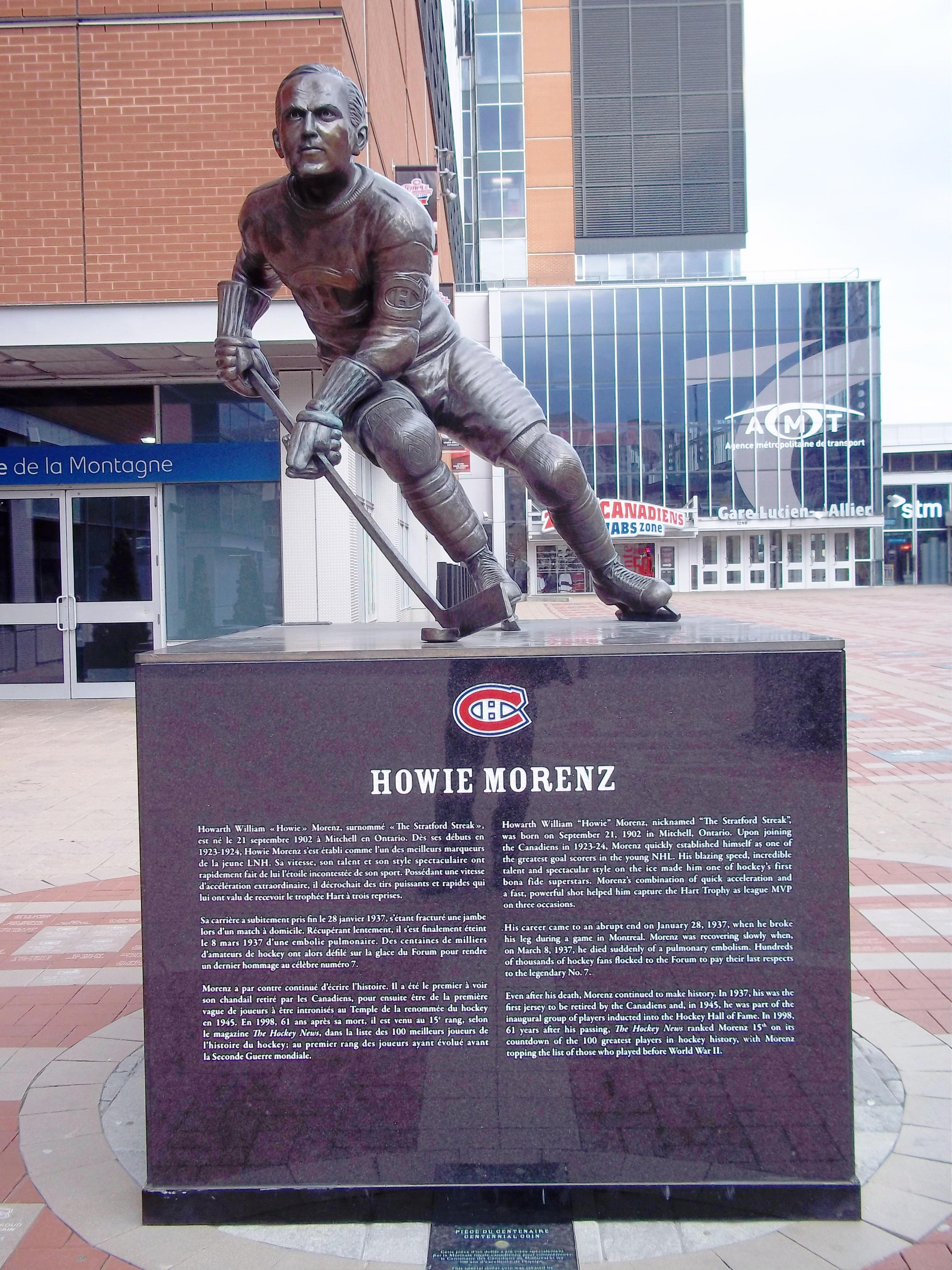 Statue de Howie Morenz, Centre Bell, Montréal